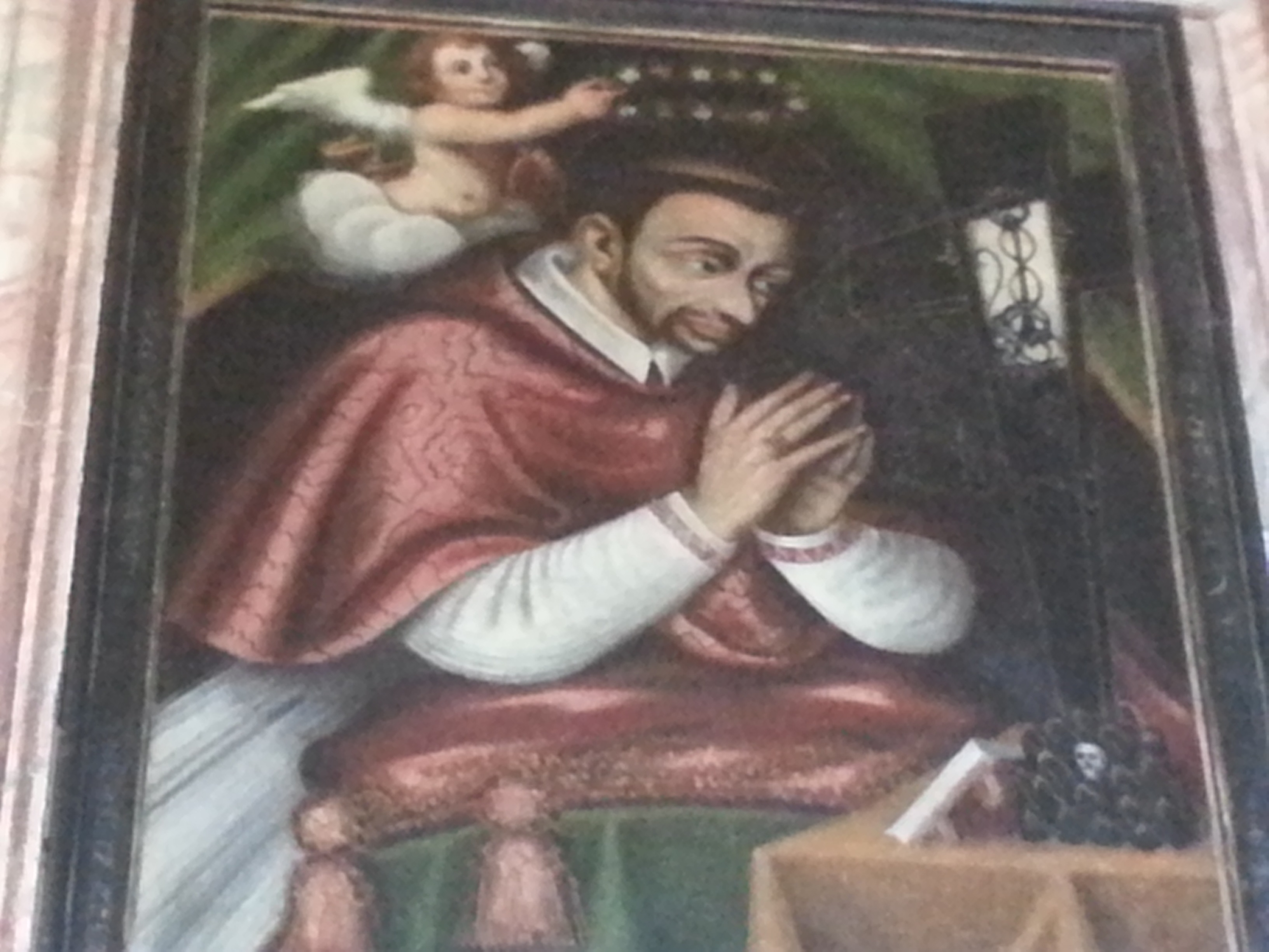 San Carlo Borromeo chiesa di San Michele Arcangelo in Colarete di Valgoglio